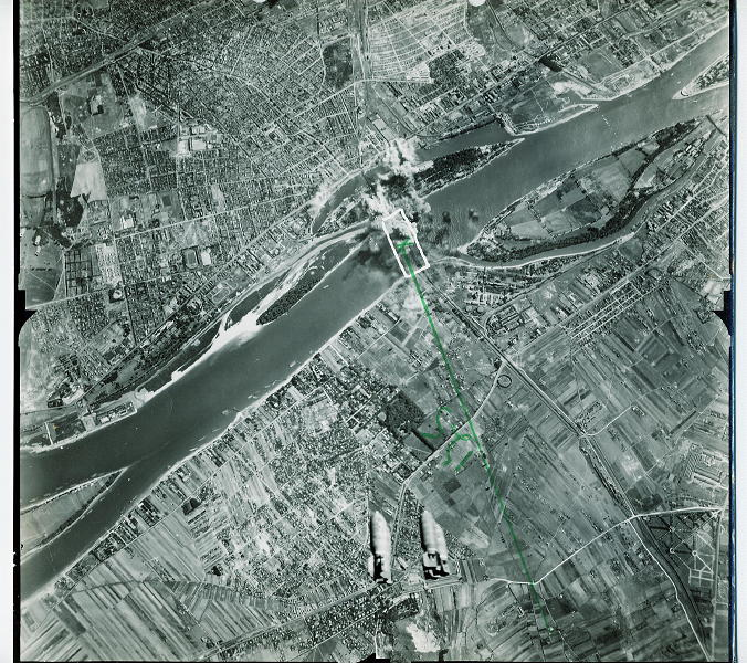 Amerikai légitámadás az újpesti vasúti híd ellen, valamikor 1944-ben.